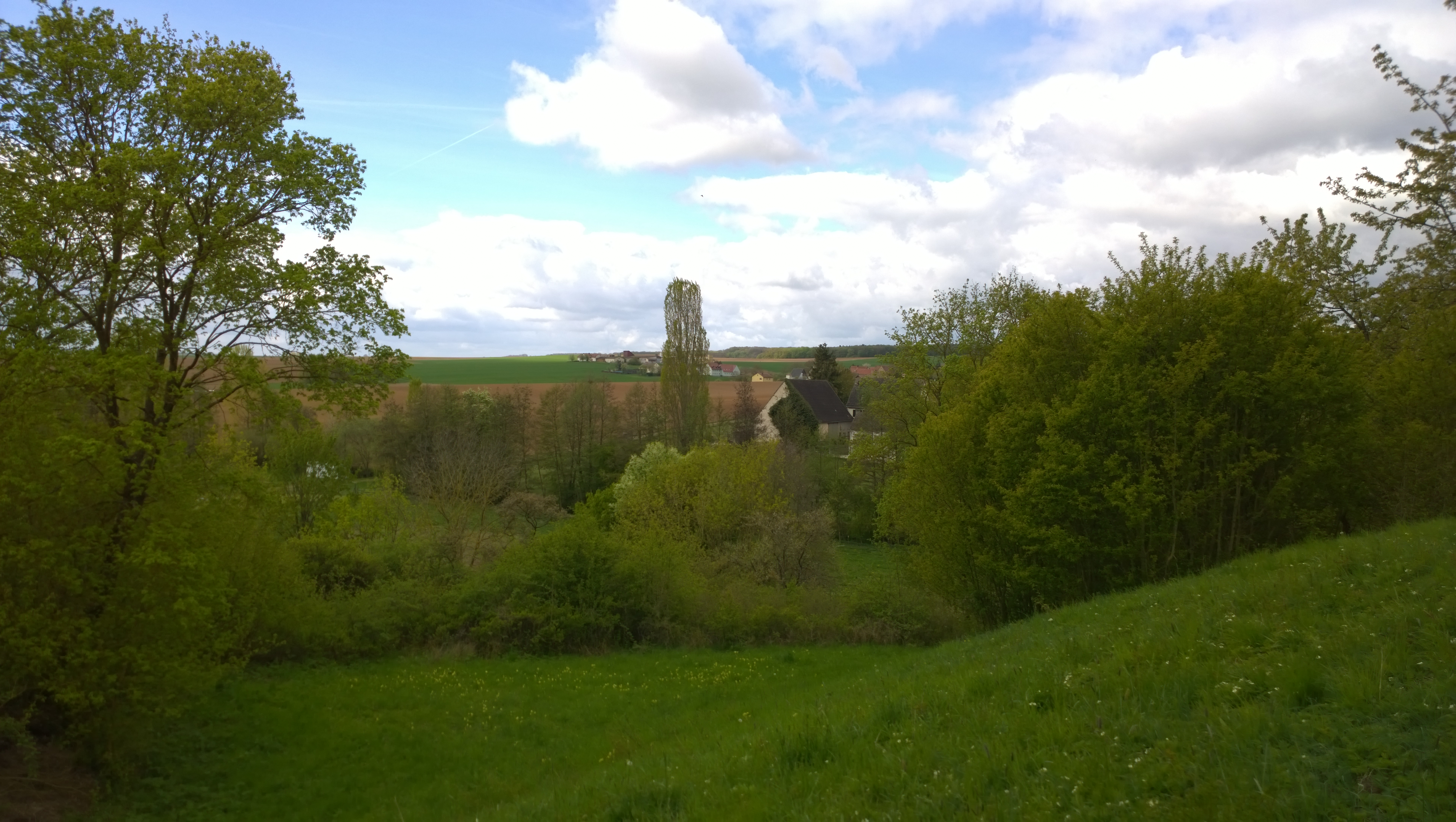 Burgstall Erbshausen: Blick vom Turmhügel nach Südwesten übder die schmale Terasse zum Unterhof am Grumbach bis nach Hilpertshausen